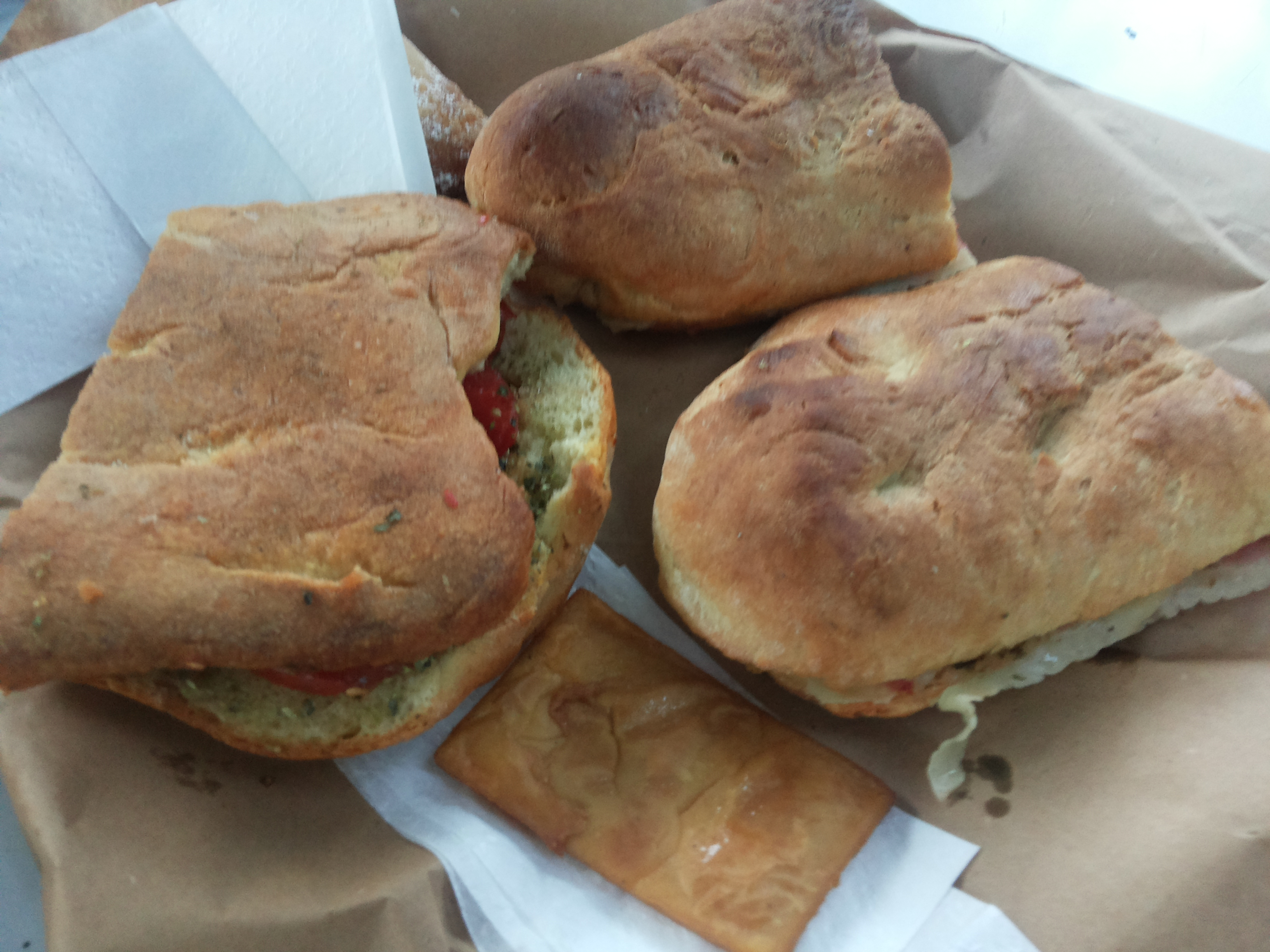 "Pani cunzatu" al baglio di Scopello, presso Castellammare del Golfo (TP)